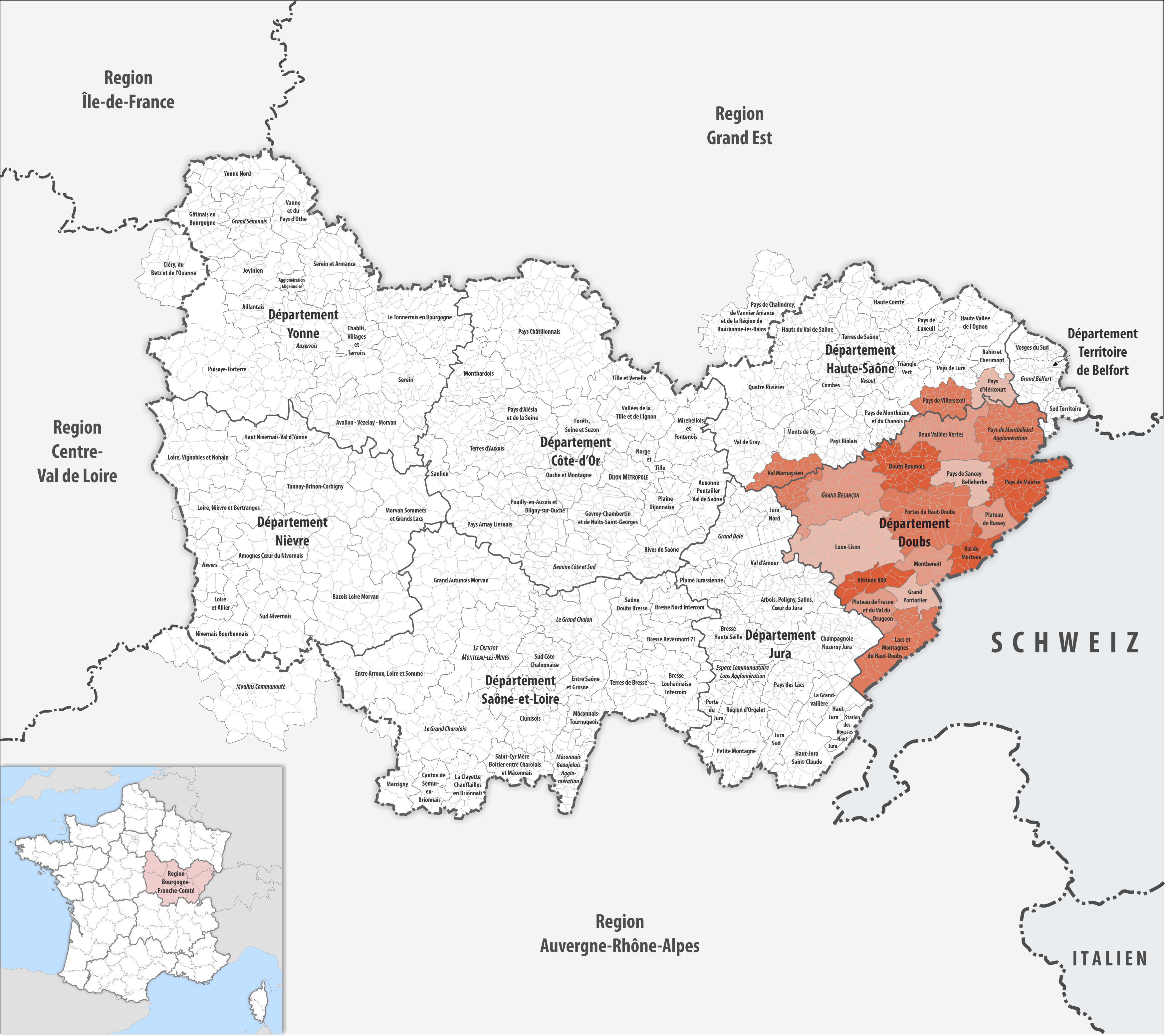 Gemeindeverbände im Département Doubs